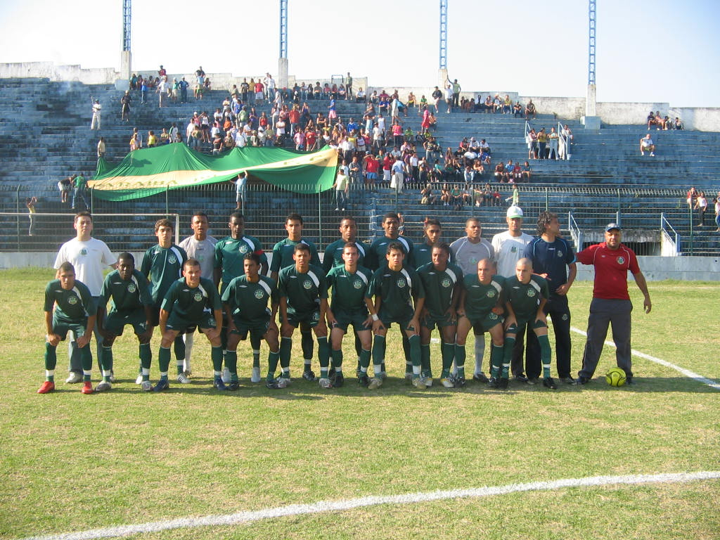 Equipe do Paraíba do Sul Futebol Clube, campeão de juniores em 2008.